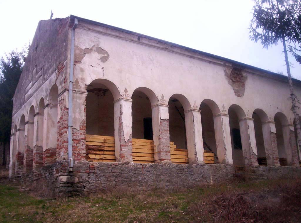 Православна црква у Крушевици, општина Власотинце. Слика број 2.